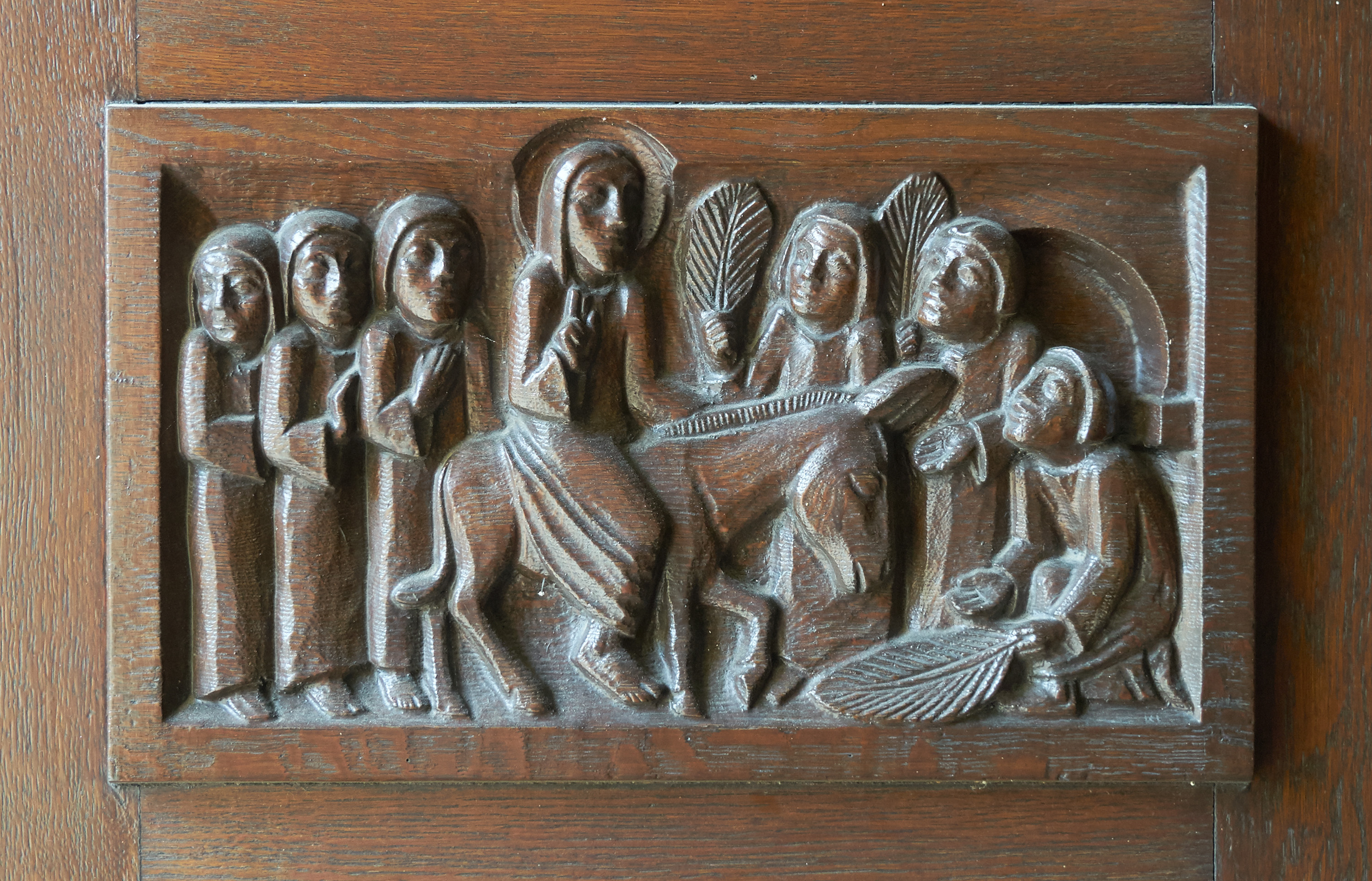 Horner Kirche in Bremen, Horner Heerstraße 30. Holzrelief an der linken Eingangstür: „Einzug Jesu in Jerusalem“.Das abgebildete Objekt ist ein geschütztes Kulturdenkmal in der Freien Hansestadt Bremen, mit der Nr. 0623 beim Landesamt für Denkmalpflege registriert.